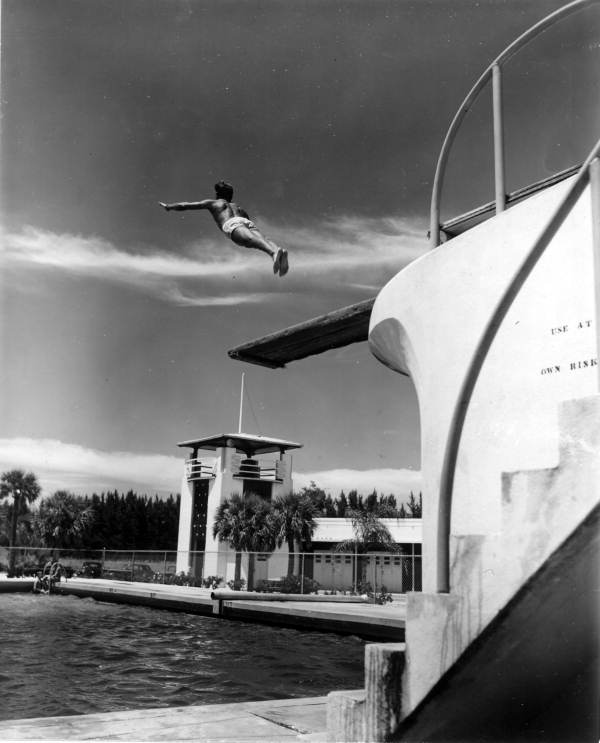 Lido Beach Pool, Sarasota, Florida (1946)